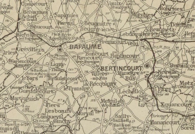 Carte de la ligne Vélu-Bertincourt